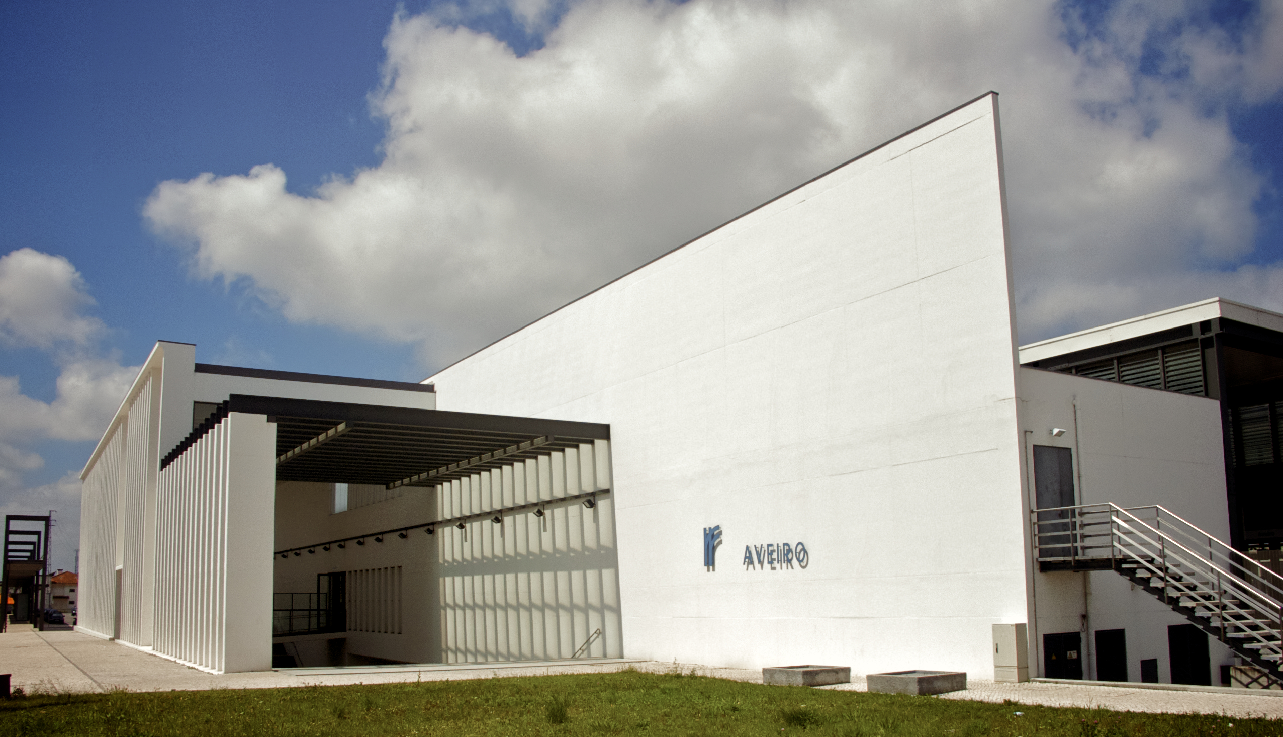 Tipo: EC [Estação de Concentração] Local: Aveiro [Linha do Norte, PK 272 • Linha do Vouga, PK 34] Data e hora: 18 de Junho de 2008 [11h37]